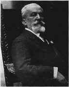 Luigi Mancinelli - Italian conductor